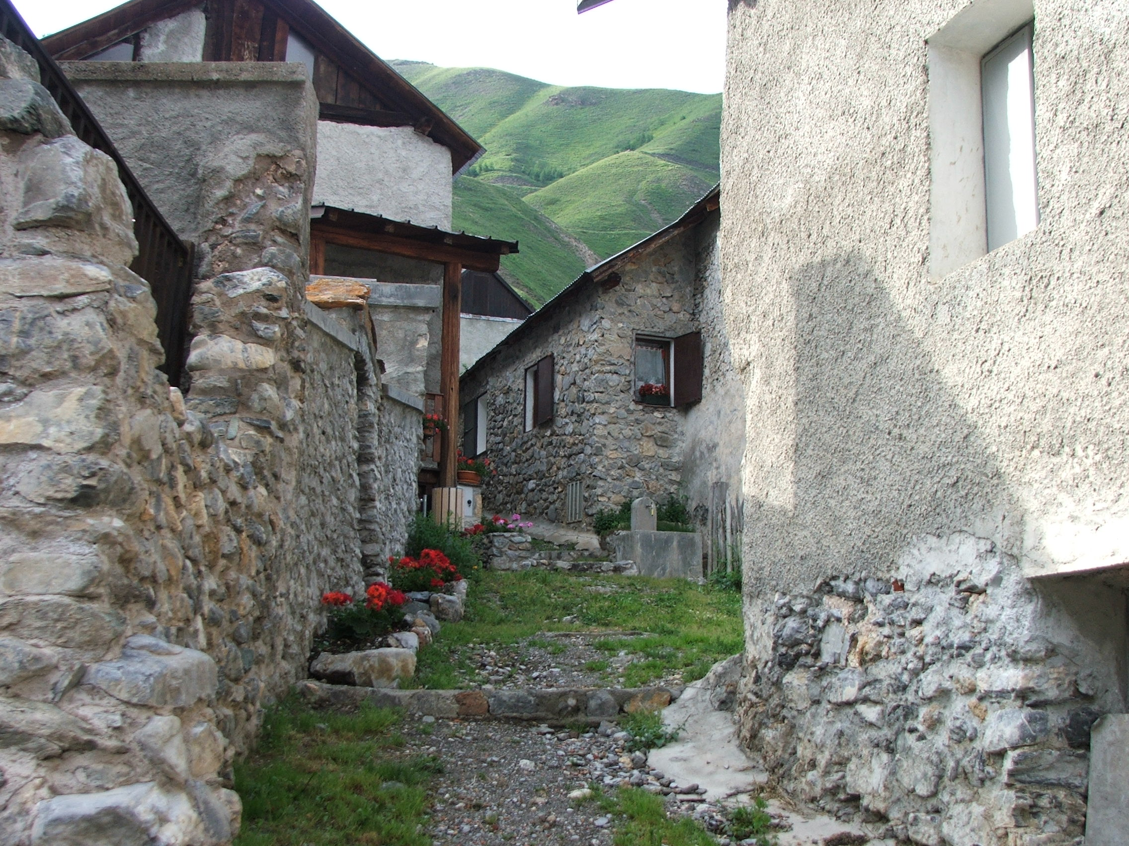 fatta da me